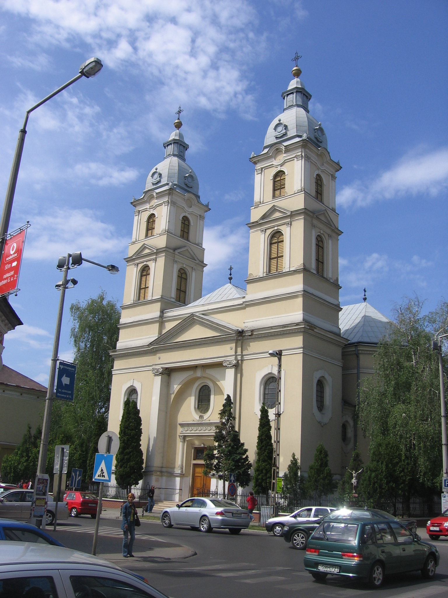 Greek Catholic cathedral in Nyíregyháza Katedra greckokatolicka w Nyíregyháza Szent Miklós Görögkatolikus Székesegyház. - Nyíregyháza, Bethlen Gábor utca This is a photo of a monument in Hungary, Identifier: 8353